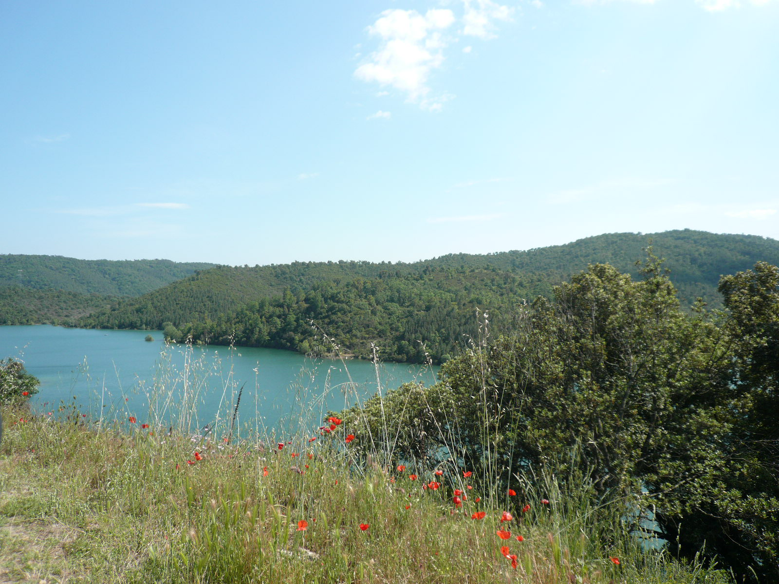 Vue de haut du lac